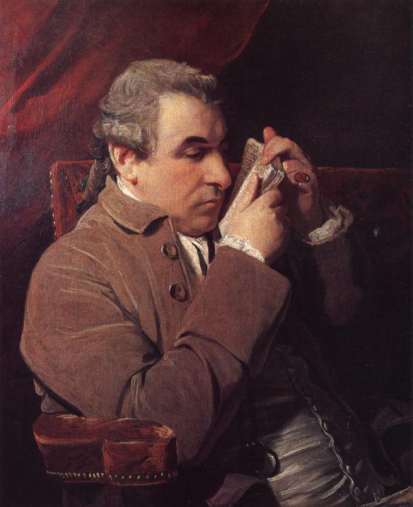 Giuseppe Baretti (1719-1789), Italian writer